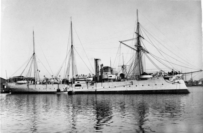 SMS "Geier", Kleiner Kreuzer SMS "Geier" der kaiserlichen deutschen Marine [Kleiner geschützter Kreuzer "Geier", Stapellauf 18.101894 auf der Kaiserlichen Werft in Wilhelmshaven, bestimmt zum Einsatz in den Überseegebieten, 1914 auf Hawaii interniert, nach Kriegseintritt der USA konfisziert, in USS "Schurz" umbenannt, 1918 nach K]